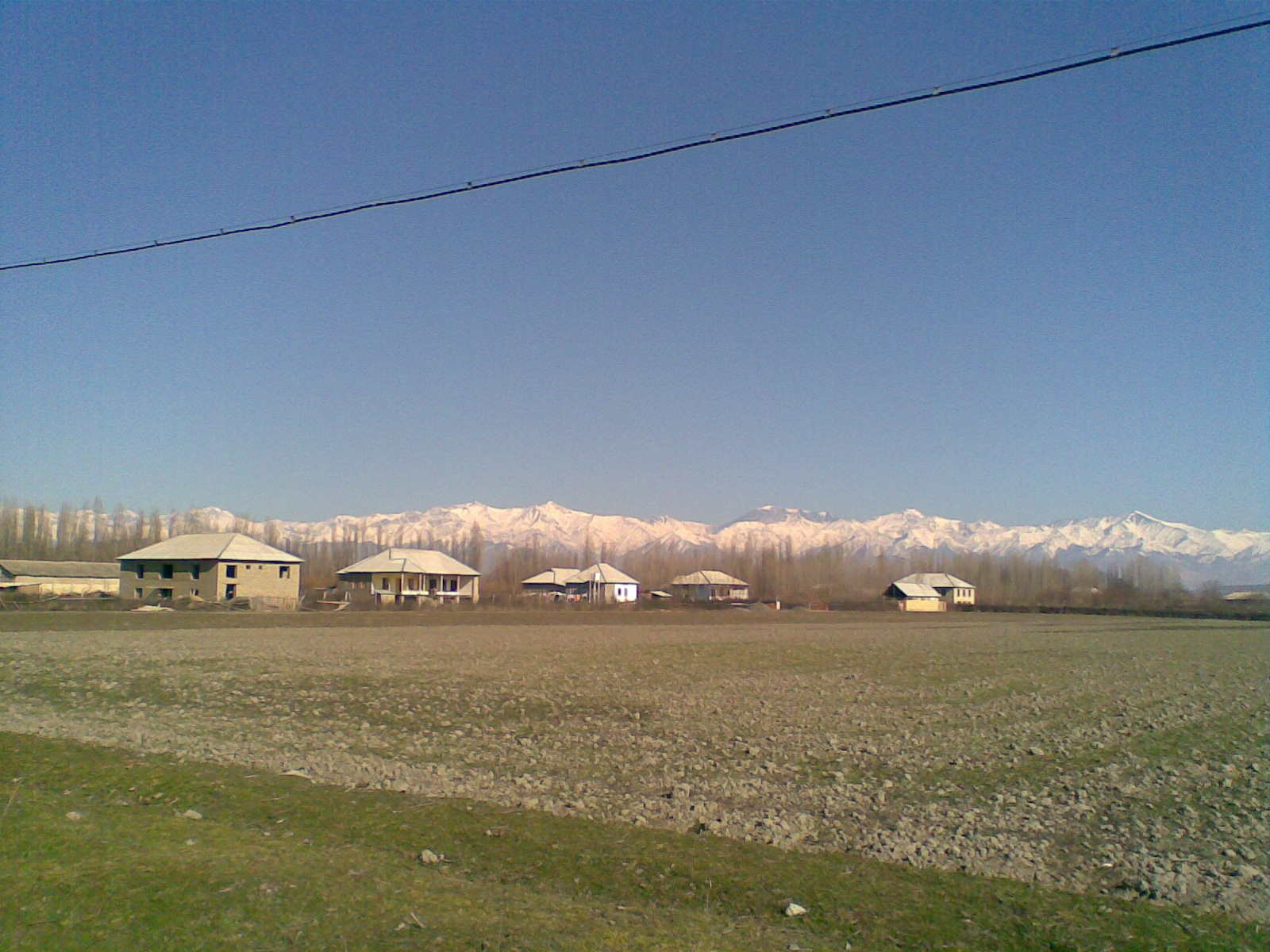 Qəbələ rayonu